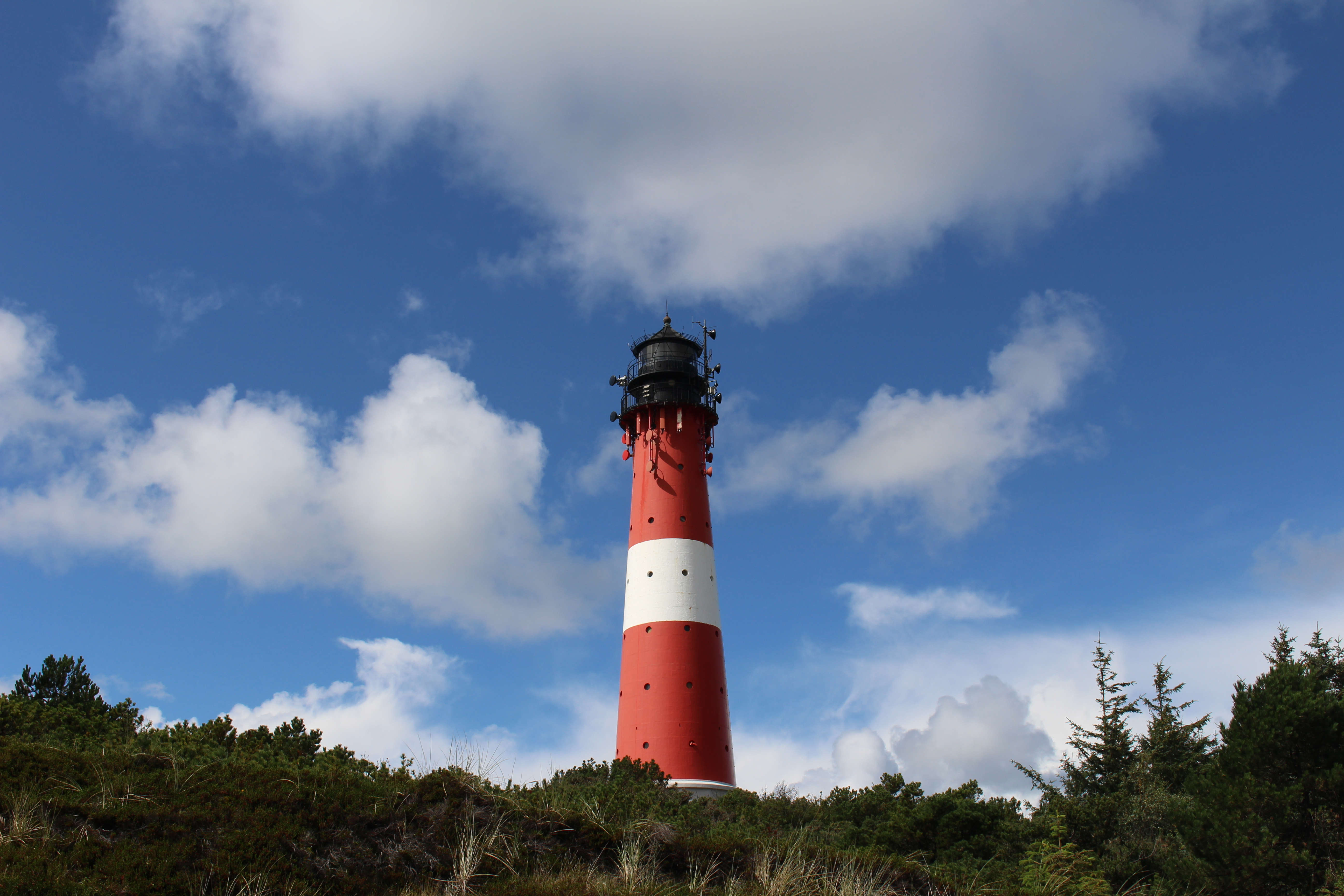 Leuchtturm von Hörnum (Sylt), aufgenommen von der Promenade